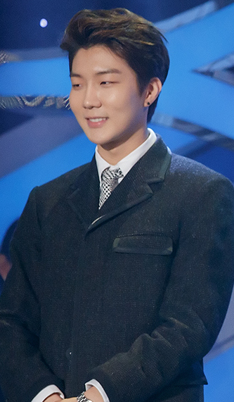 141113 위너